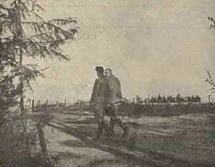 Józef Piłsudski oraz Albin Fleszar na odcinku 6 pp na "Polskiej Górze".